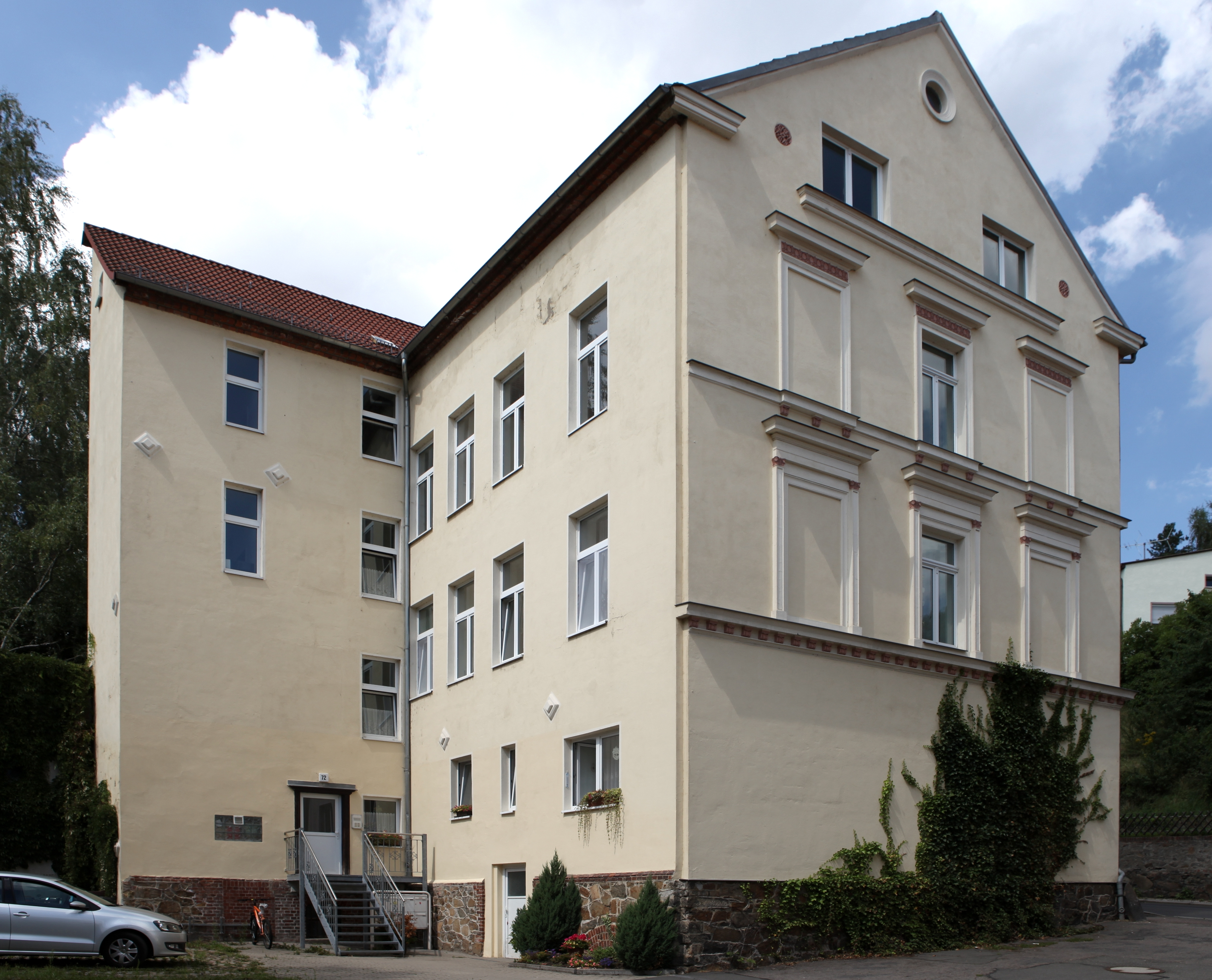 Kulturdenkmal Mietshaus Bergstraße 72 in Eilenburg; Objektnummer: 08973301